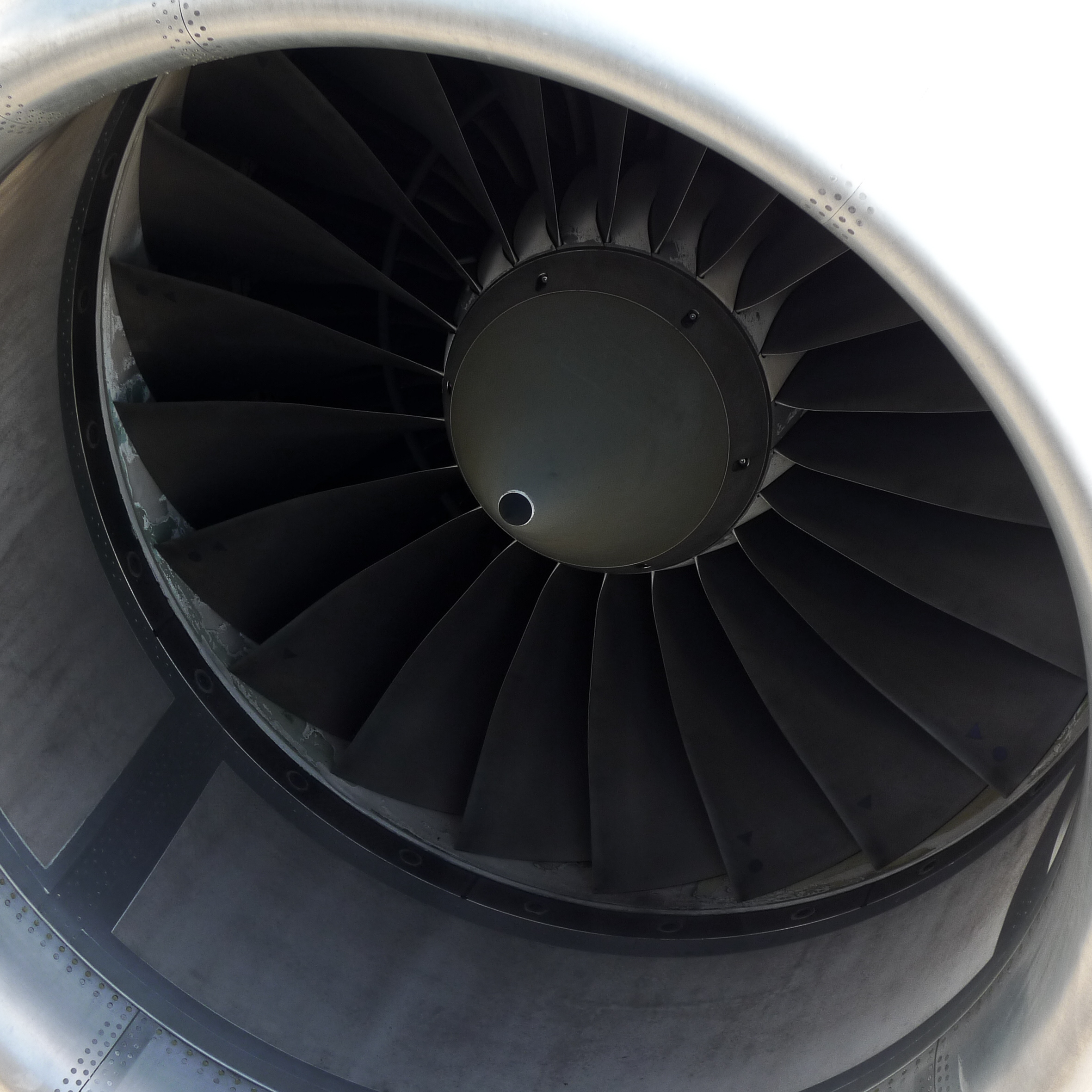 Håkan Dahlström Photography